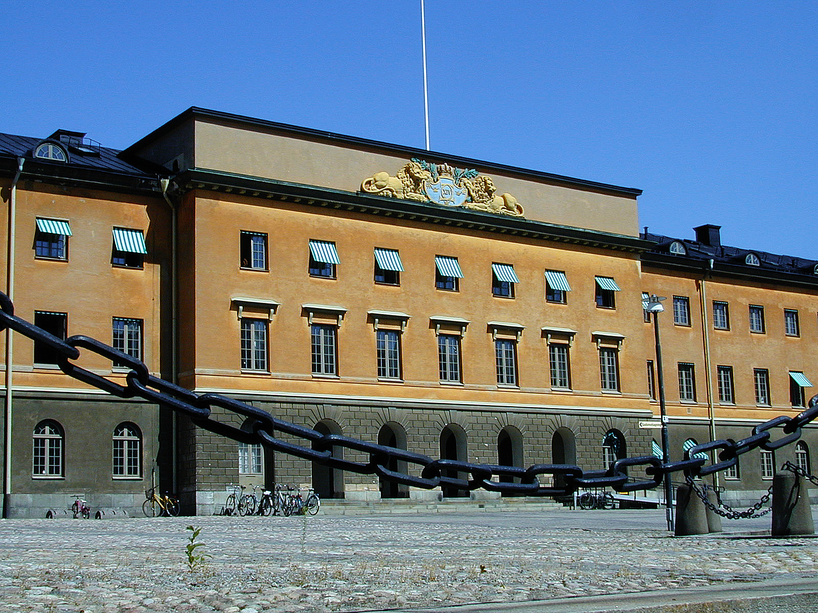 Riksantikvarieämbetets huvudkontor i Stockholm. Storgatan 41. Byggnaden är före detta kanslikasernen för Livgardet till häst (K 1).